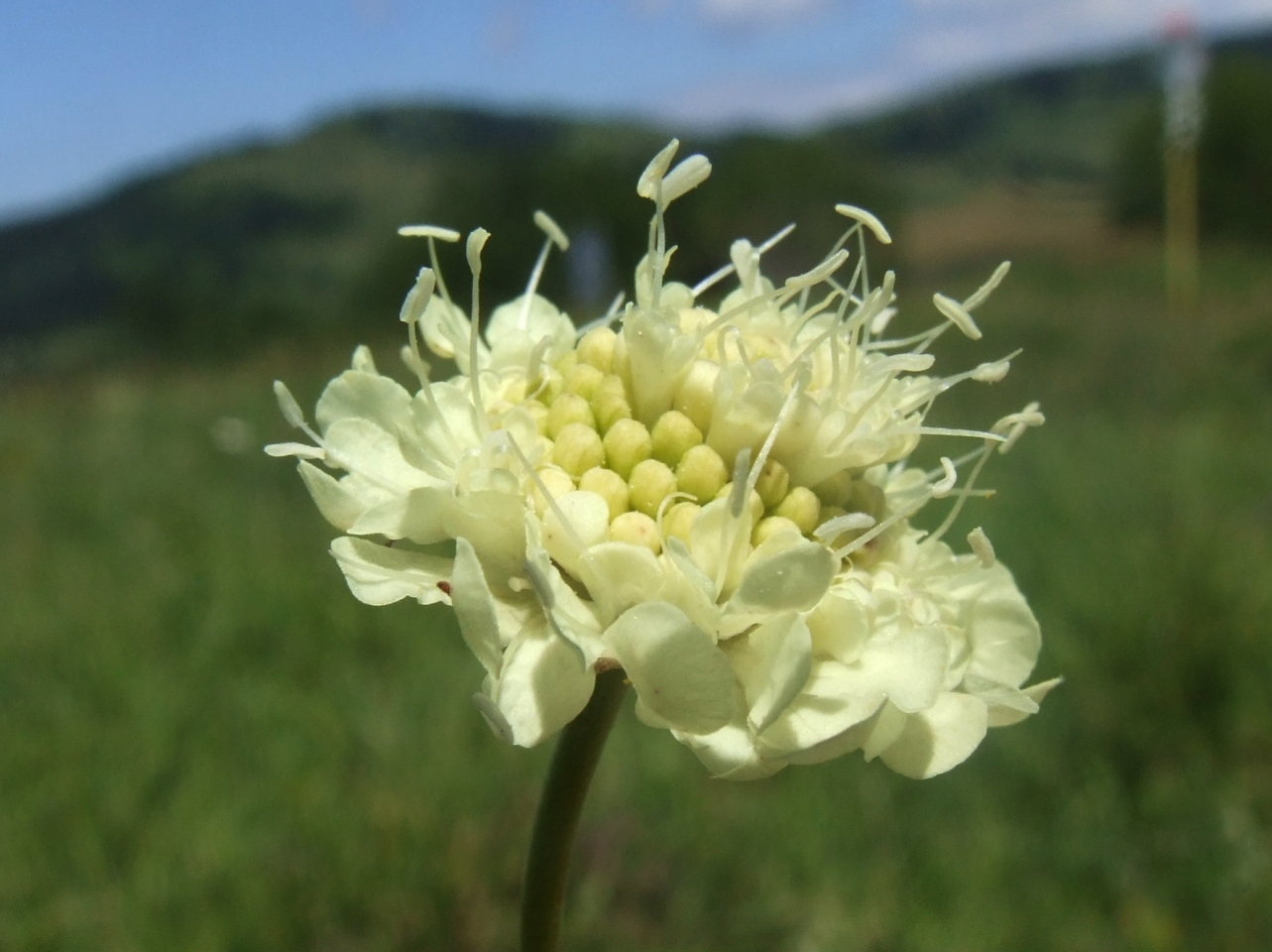 Scabiosa ochroleuca (pl. driakiew żółta)